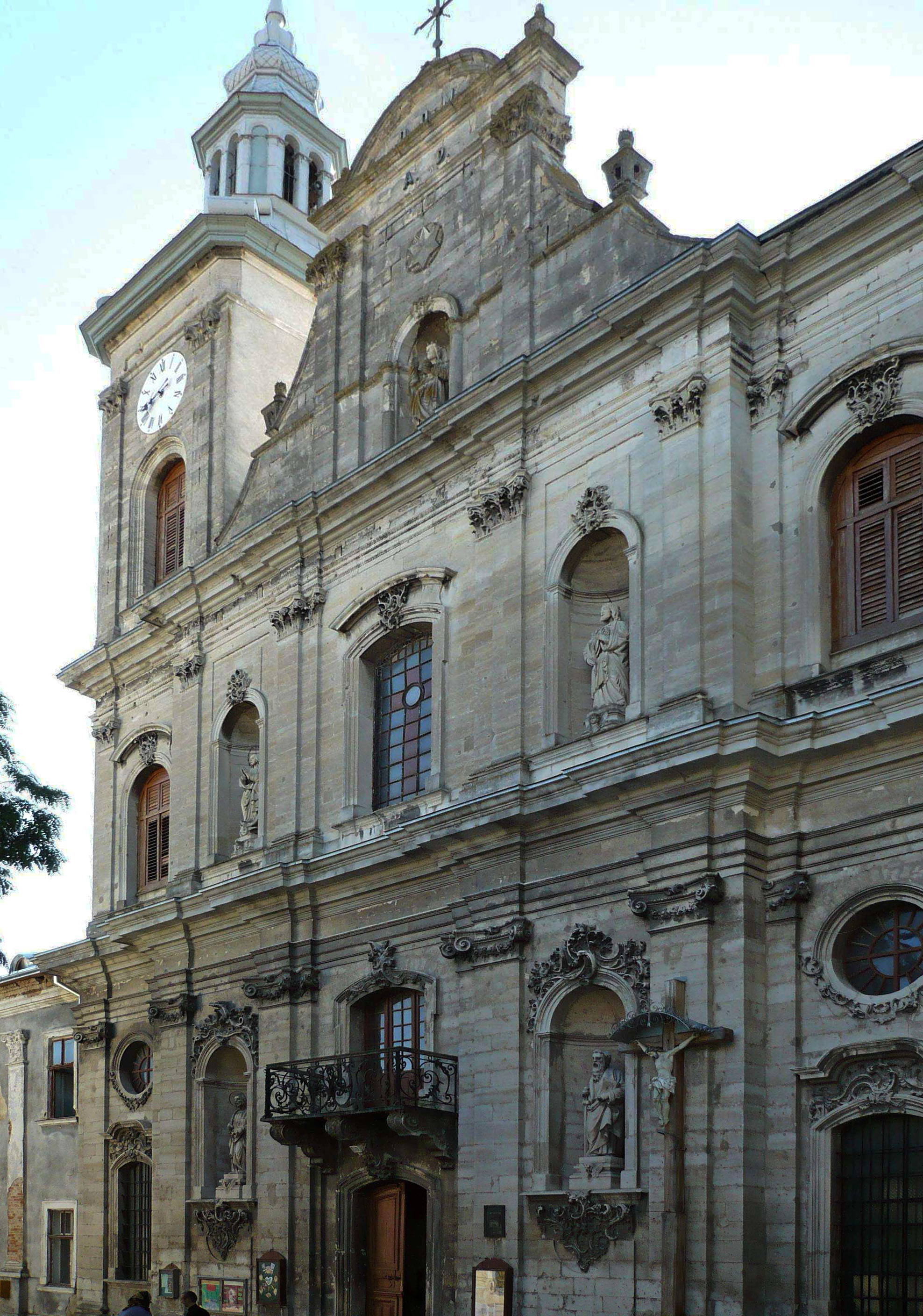 Kościół pw. Wniebowzięcia NMP w Złoczowie